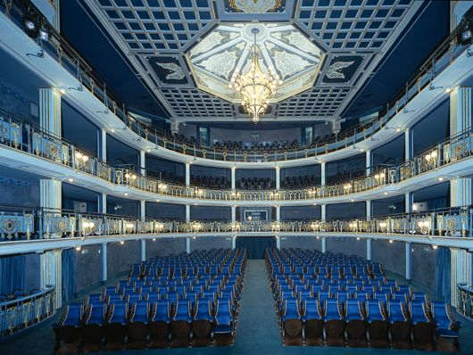 Teatro sociale di Brescia